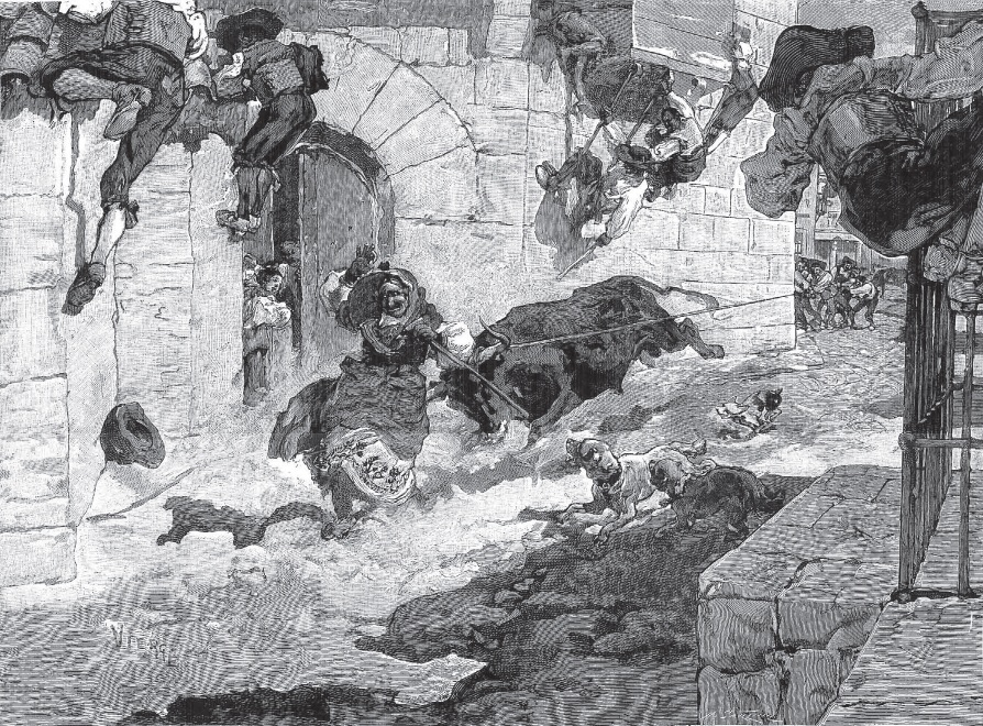 Toros en Salamanca. Dibujo y composición de Daniel Urrabieta y Vierge.